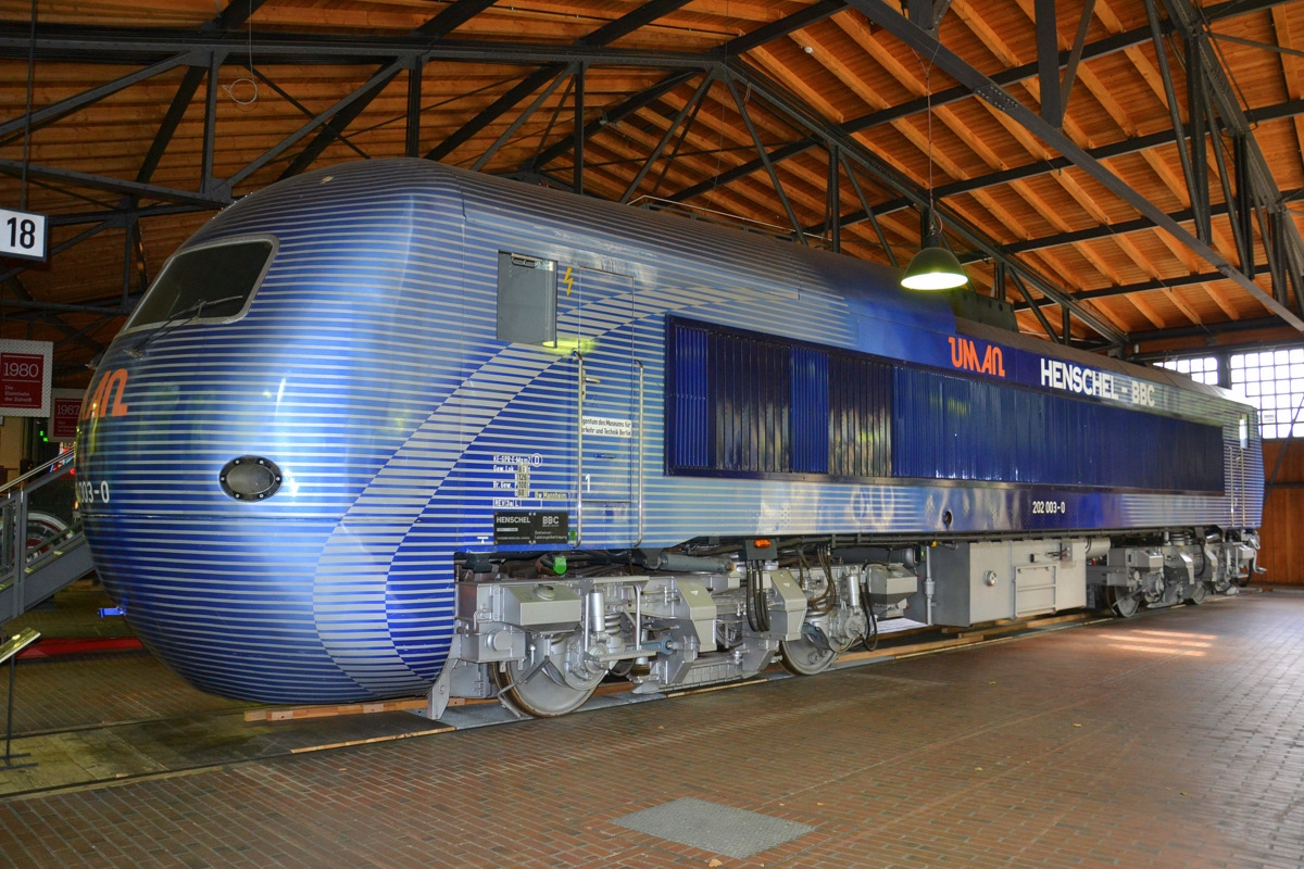 Экспериментальный тепловоз Henschel-BBC DE2500 в Немецком техническом музее в Берлине